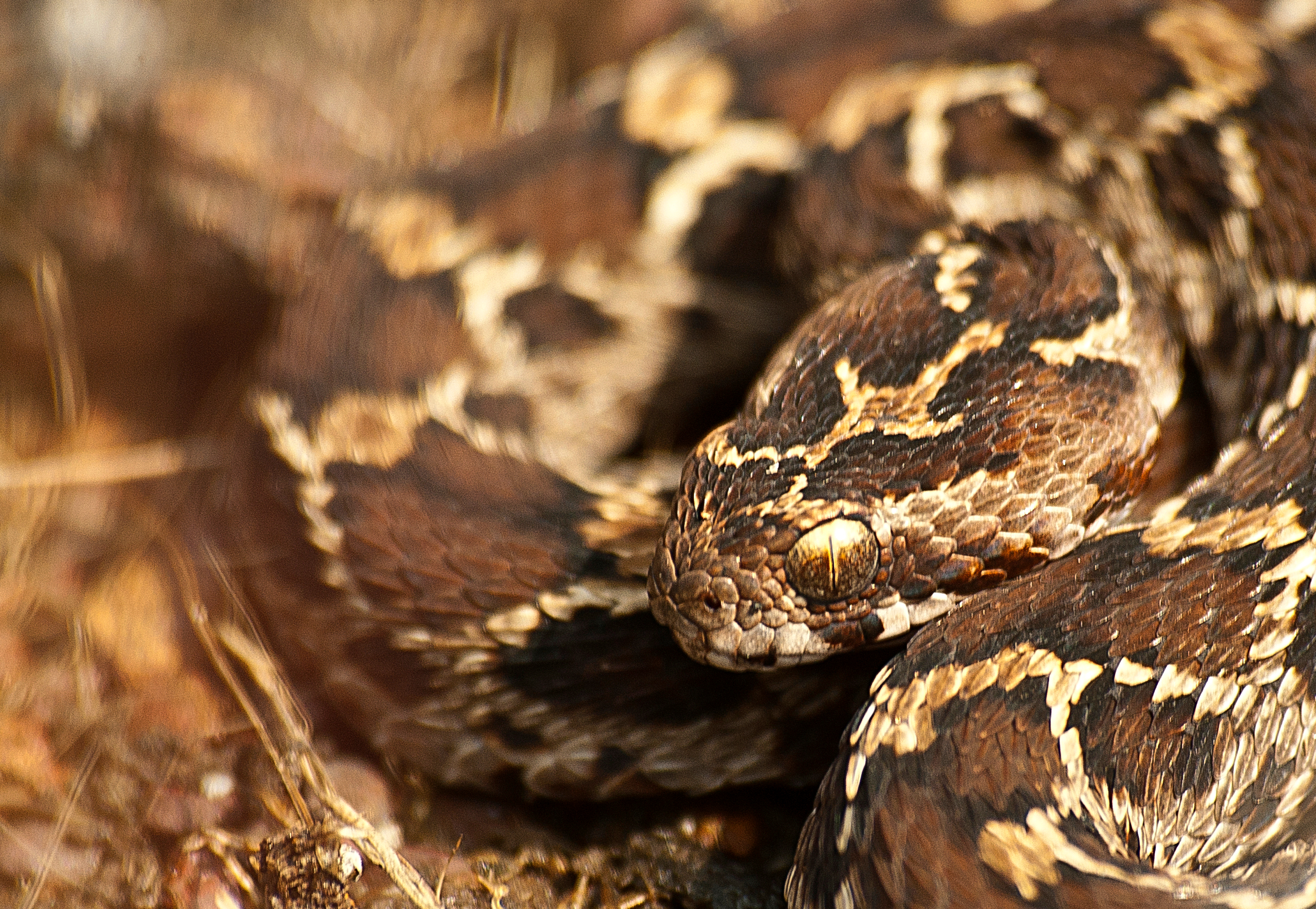 ചുരുട്ടമണ്ഡലി